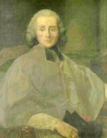 Photographie du portrait de Mgr Claude Marc-Antoine d'Apchon de Corgenon (1721-1783), évêque de Dijon (1755-1776) puis archevêque d'Auch (1776-1783), exécuté par Adèle Dugied (XIXe s), d'après celui réalisé par Anton Johann Tischbein (XVIIIe s). Ce portrait est conservé au musée des Beaux-Arts de Dijon (21).